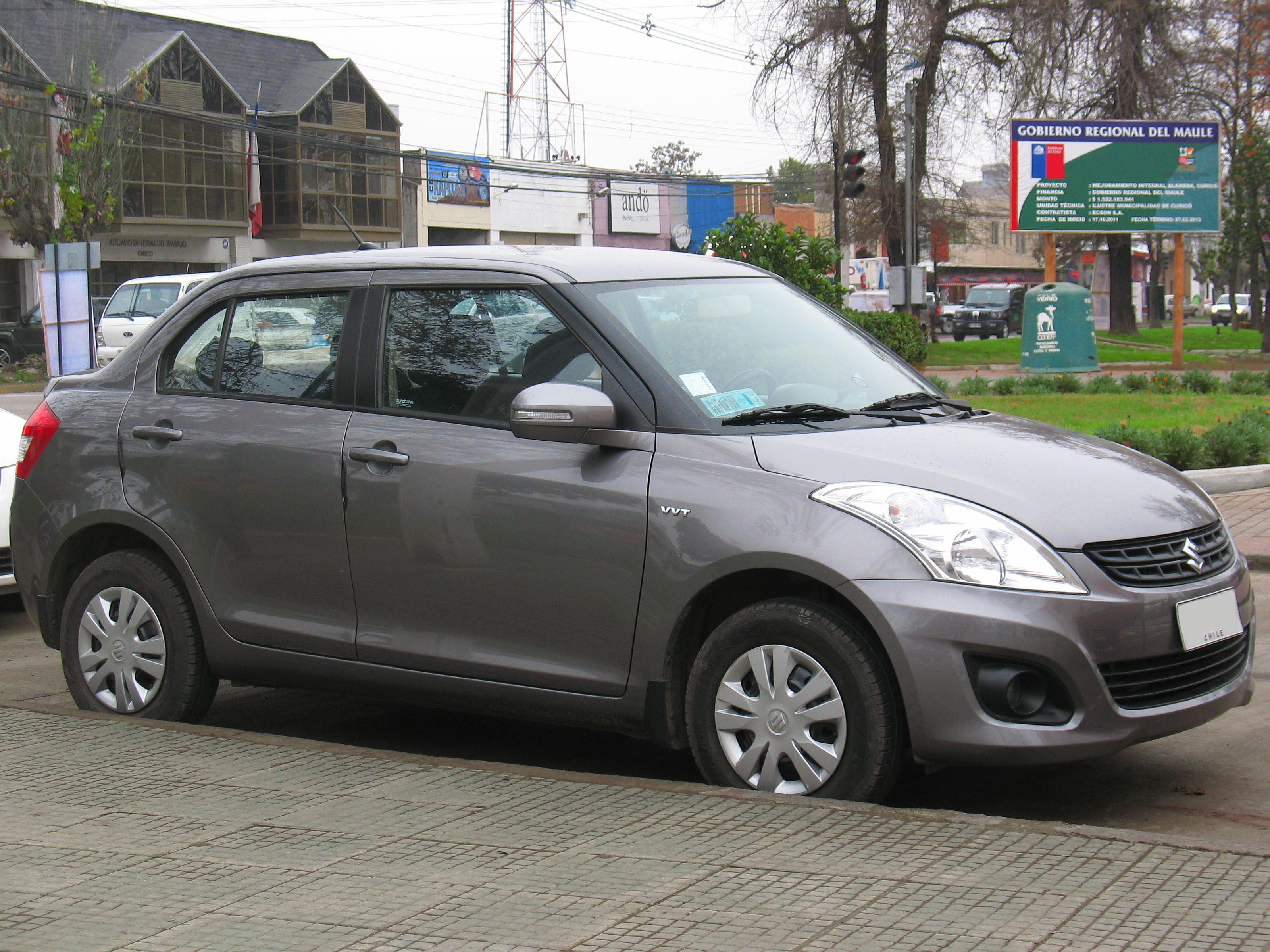 Suzuki Swift Dzire 1.2 GL 2013